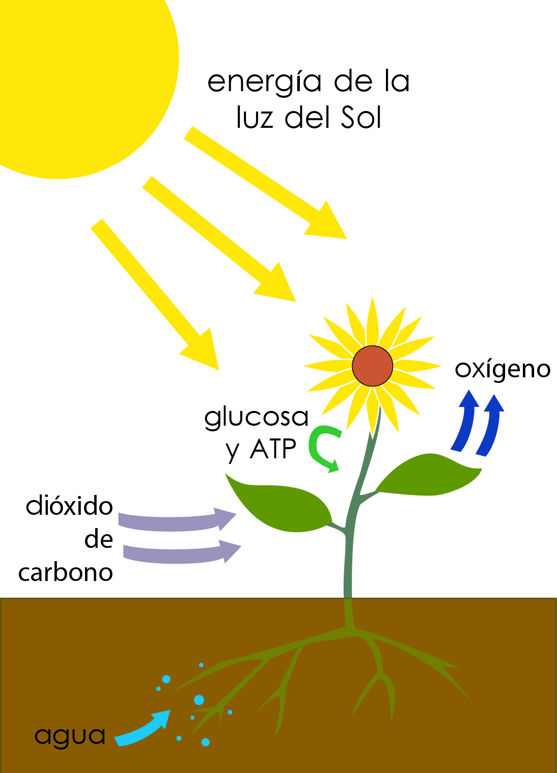 Química de la fotosíntesis: Reactivos y productos. Traducido al español y derivado de File:Photosynthesis.gif